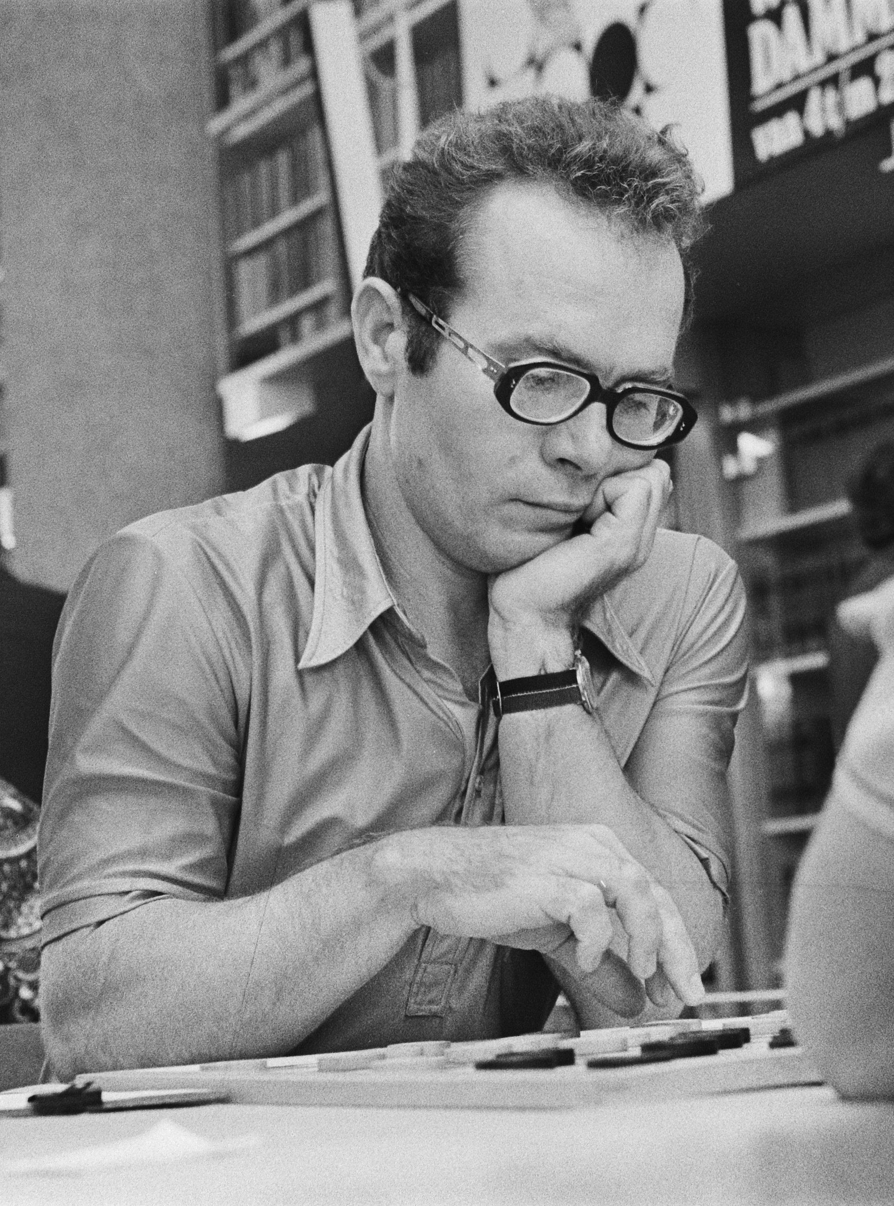 Sheila Young